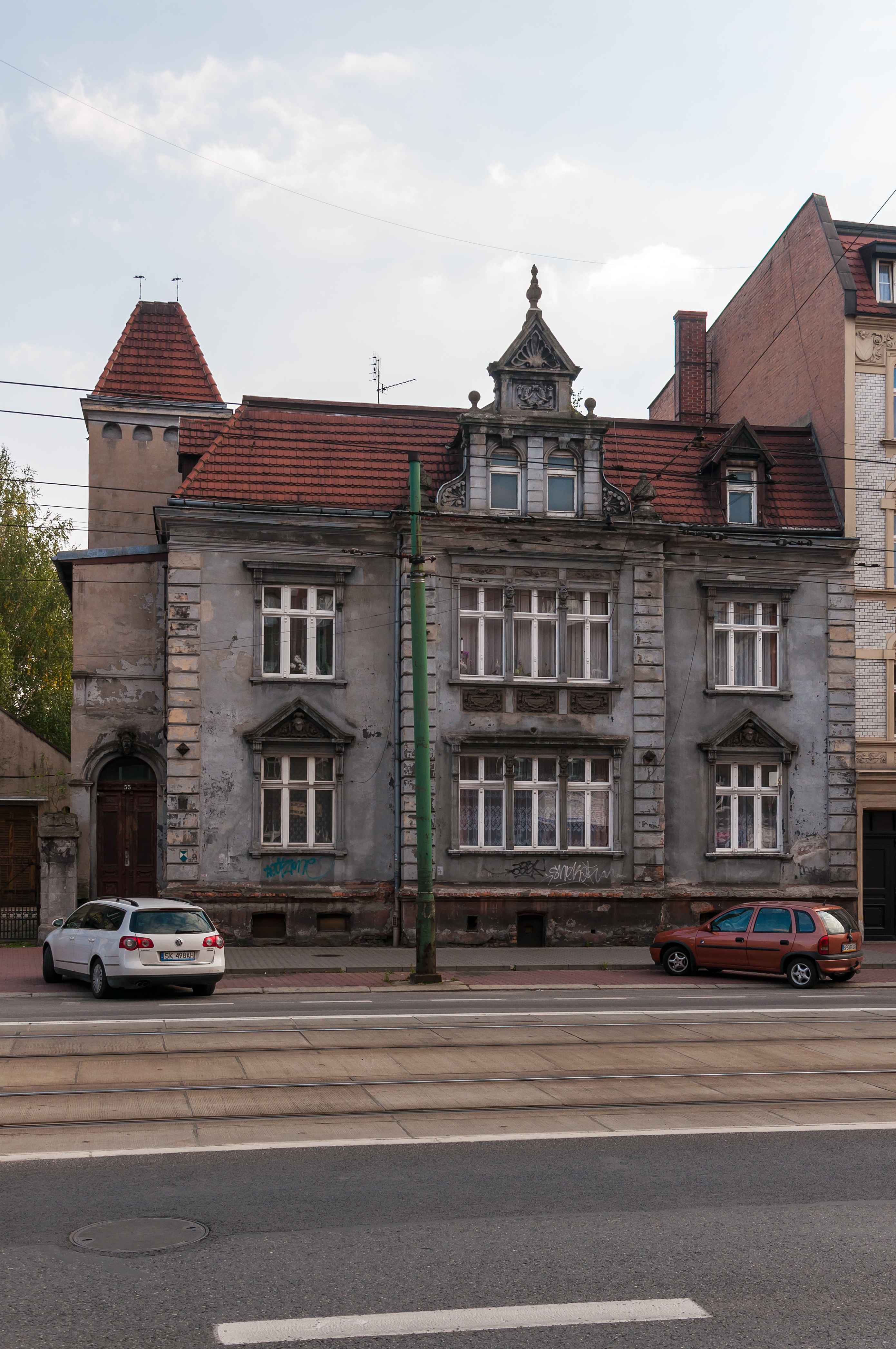 Willa Oskara Działoszyńskiego, Katowice, Warszawska 55. Budynek oznaczony znakiem "zabytek" (widoczny na zdjęciu), ale nieujęty w spisie zabytków.